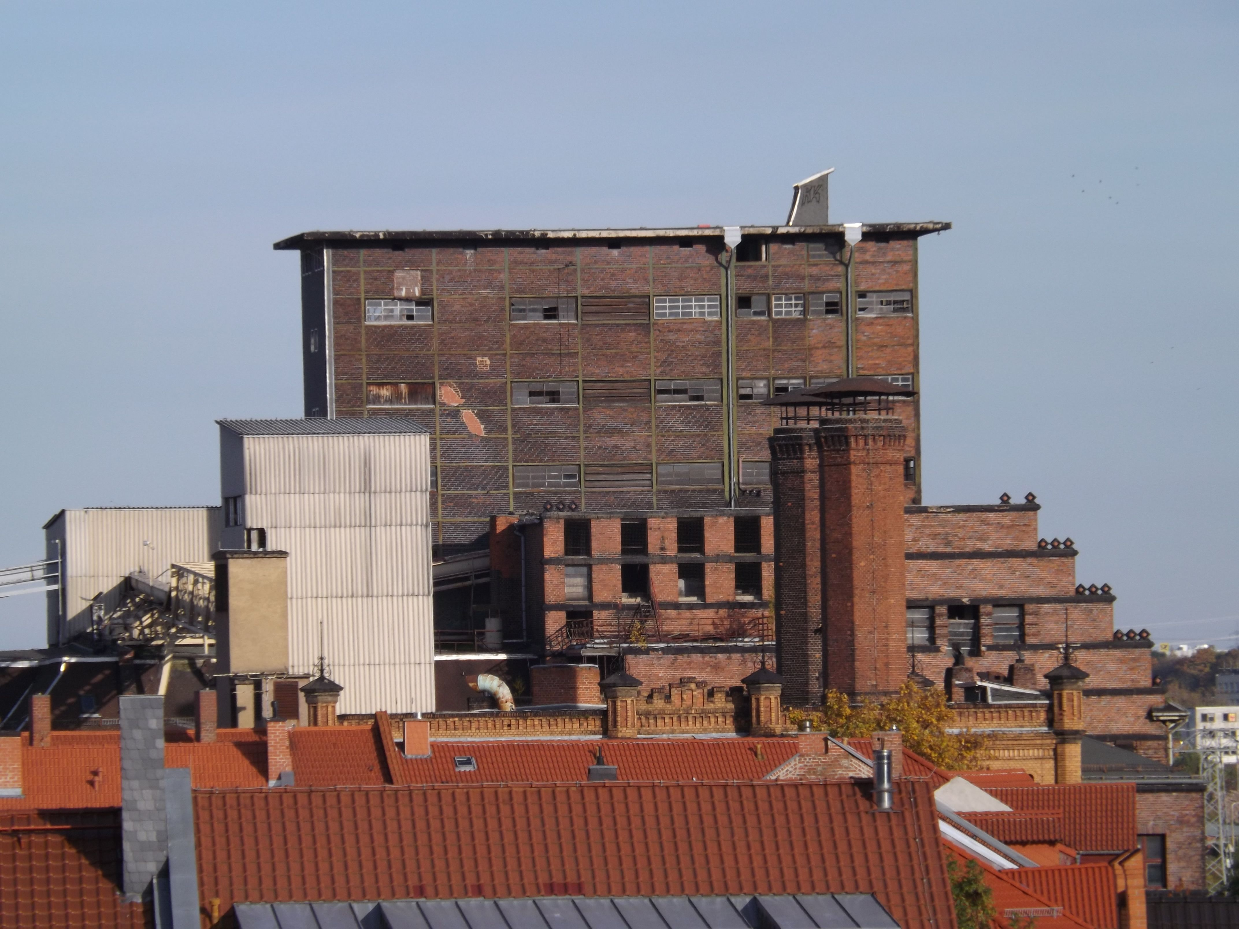 Ansicht der ehemaligen Malzfabrik Fa. Wolff in Erfurt, im Quartier zwischen heutiger Thälmannstrasse (Ansichtsseite von Westen), Theo-Neubauer-Strasse (Norden) und Iderhoffstrasse (Süden). Aufgenommen vom Dach des Parkhauses Anger 1, Luftlinie ca. 450 m